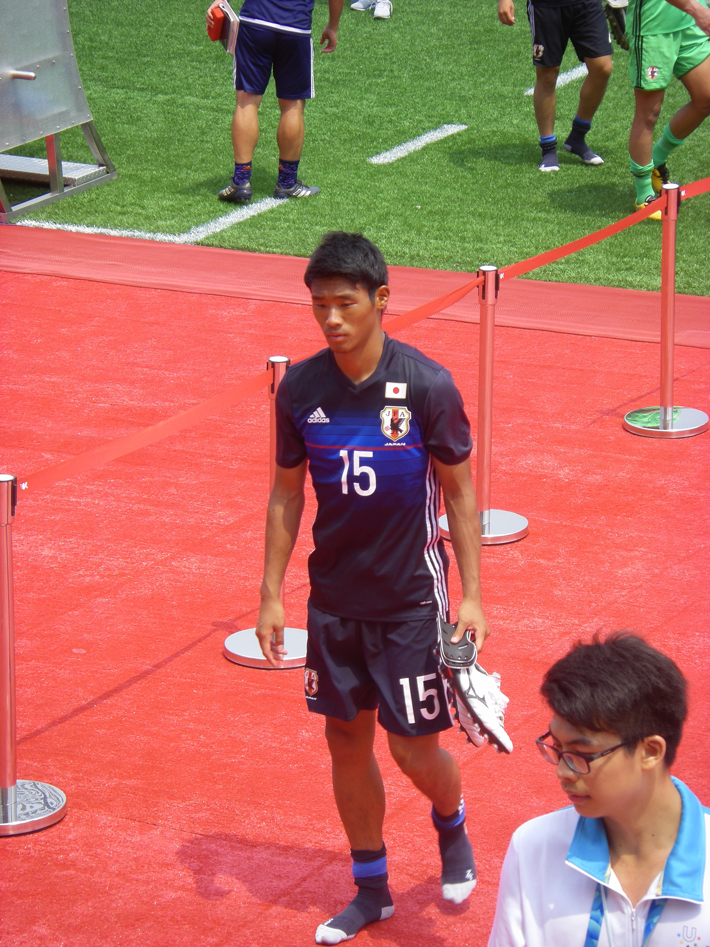 中文（台灣）: 來台灣參加2017年夏季世界大學運動會足球比賽的日本足球運動員守田英正